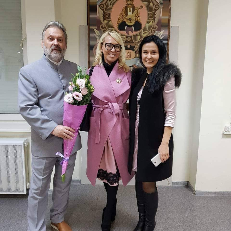 Персональна виставка К. Могилевського